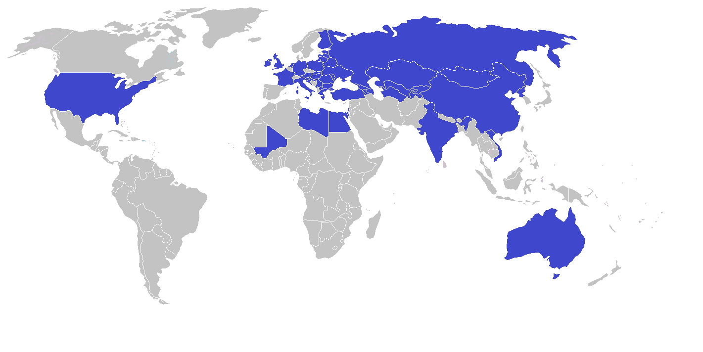 Карта на участвалите страни